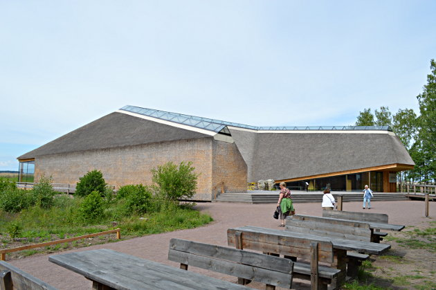 Naturum-byggnaden vid sjön Tåkern i Östergötland.